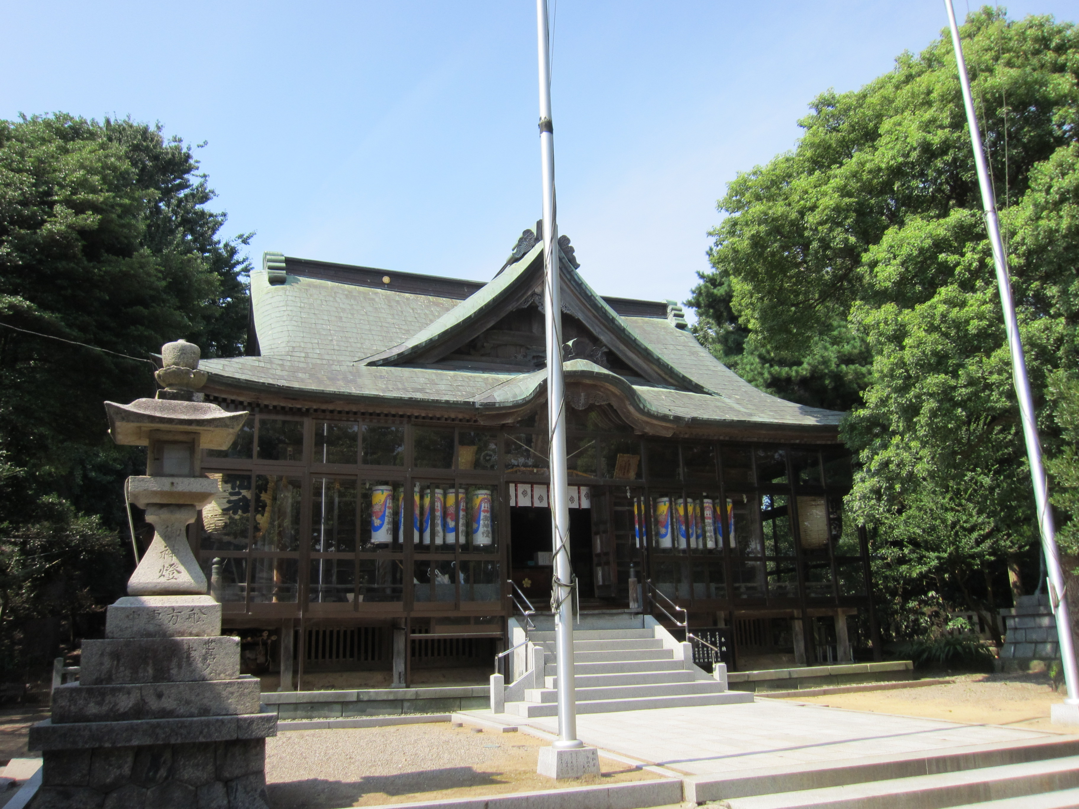 羽咋神社 拝殿